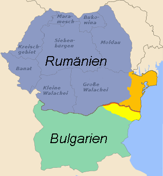 Deutsche Übersetzung der englischen Karte der Dobrudscha in Rumänien und Bulgarien.